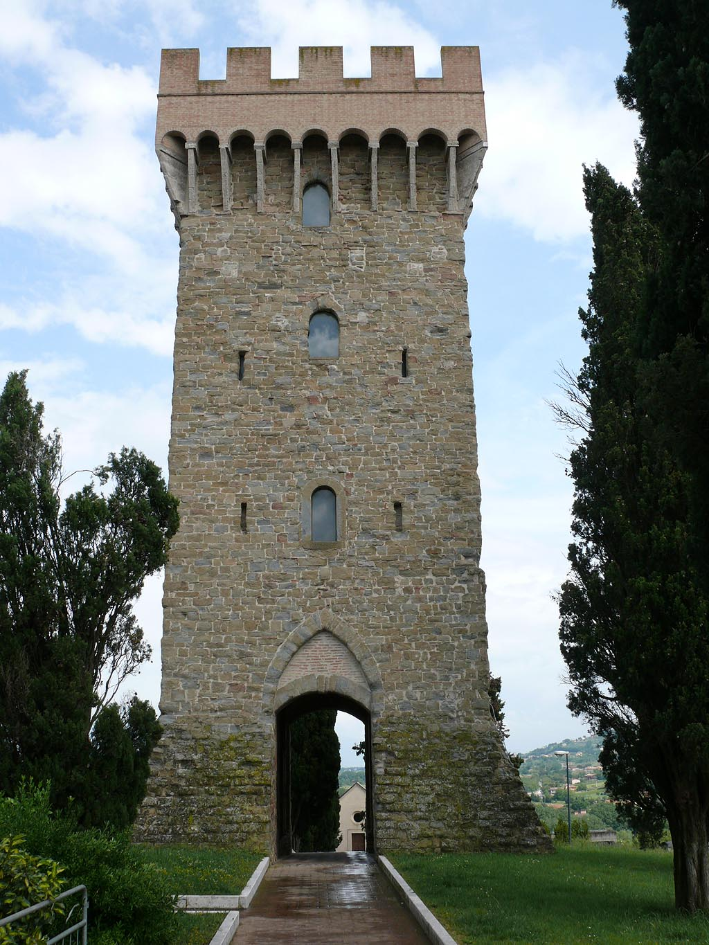 Torre di Guardia, o dei Baglioni